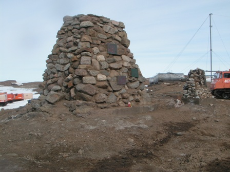 福島ケルン。昭和基地の近くに立っている。第4次南極観測隊の越冬隊隊員である福島紳の死を悼むために作られた